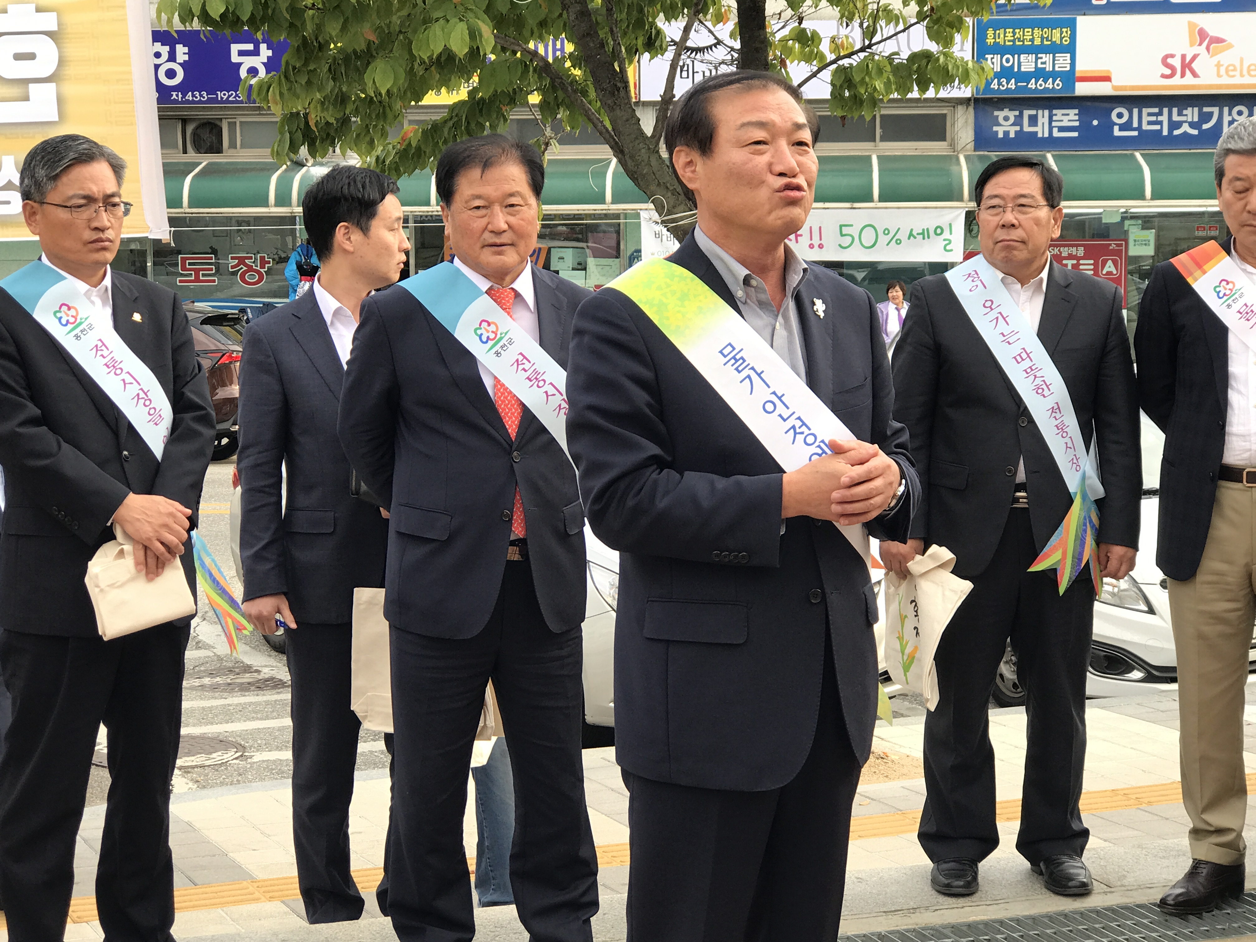 2017년 9월 29일 강원도 경제부지사 정만호가 전통시장 장보기 캠페인의 취지를 설명하고 있다.